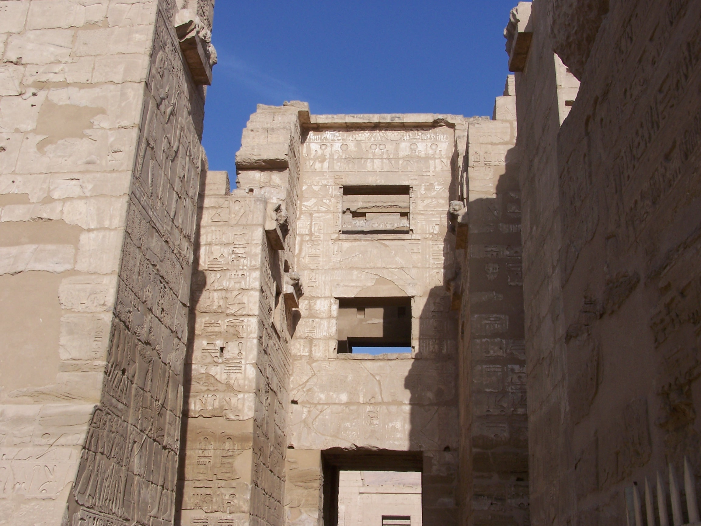 Migdol du temple de Ramsès III à Medinet HAbou